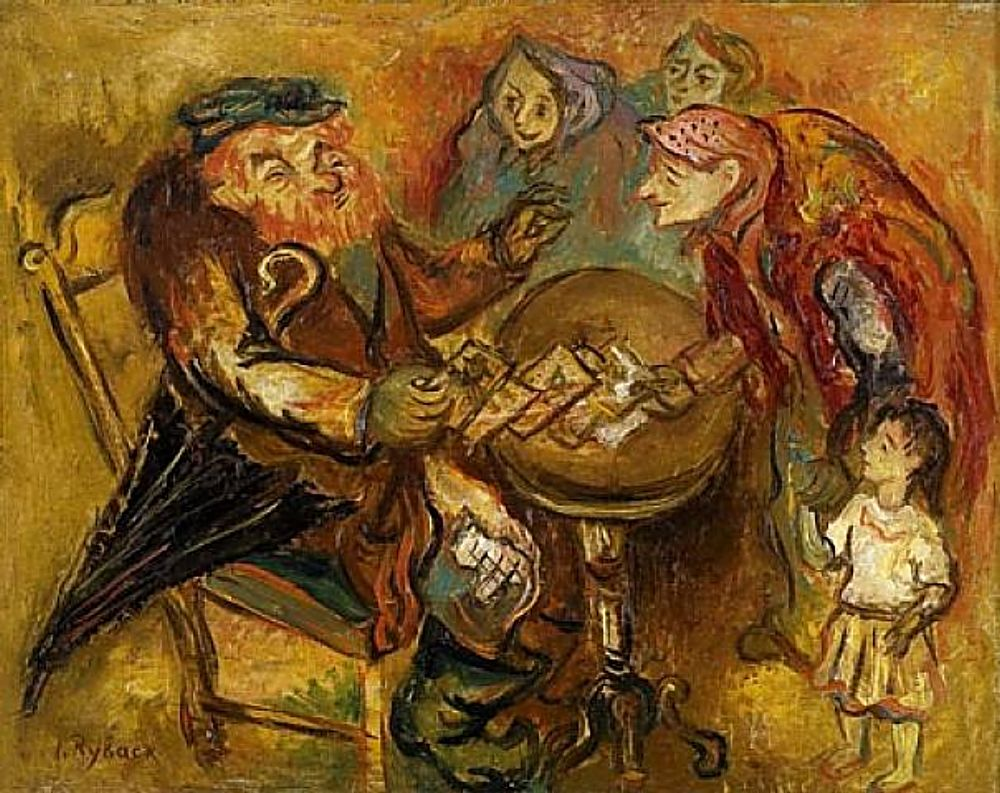 Рыбак Иссахар Бер. "Картежники"